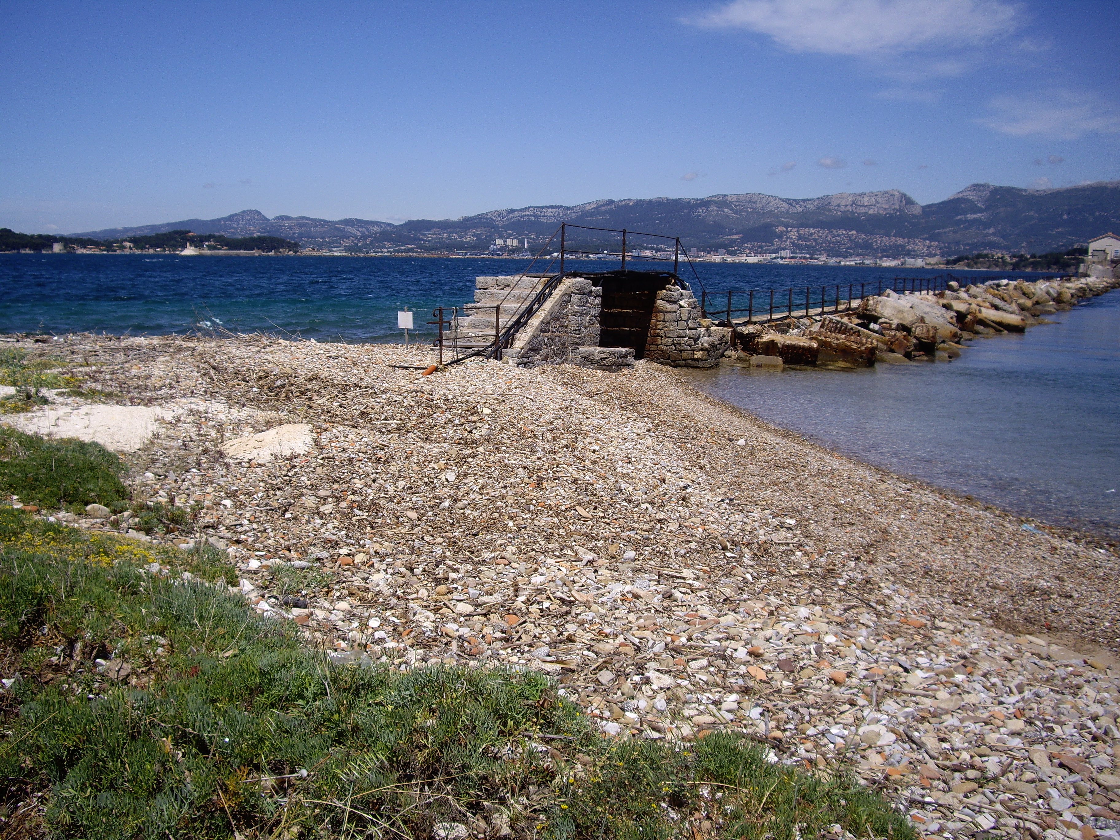 Trashtag 2007 Saint Mandrier France Clean by Stephane Belgrand Rousson